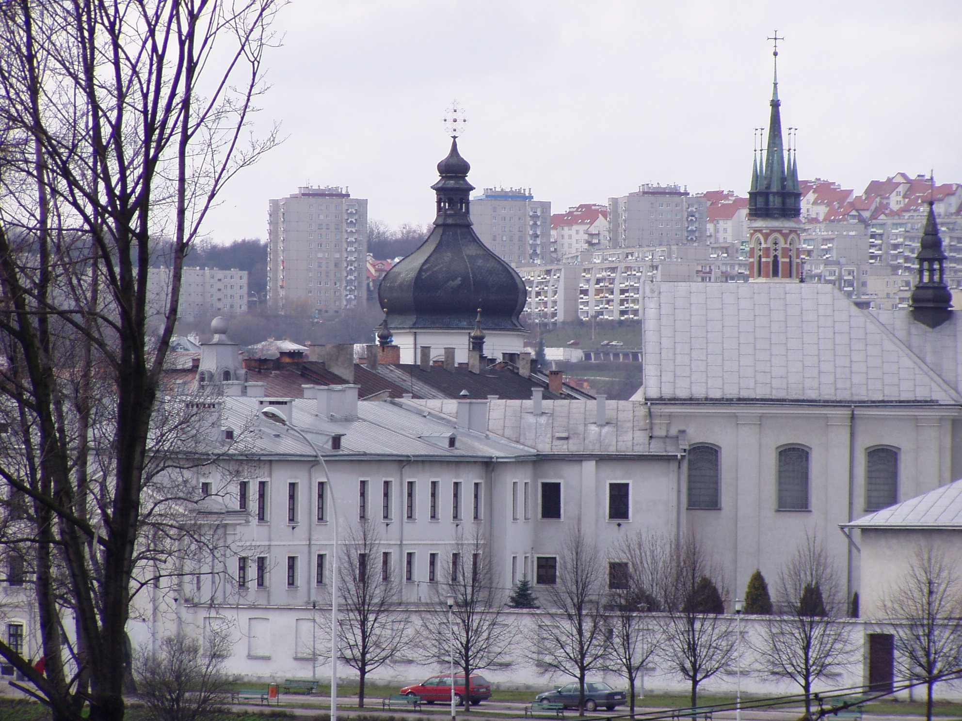 Klasztor Zakonu Bazyliańskiego Świętego Jozafata p.w. Współcierpienia Najświętszej Bogurodzicy w Przemyślu